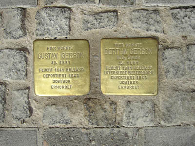 Stolpersteine Bolongarostraße 132 Freigabe für Commons-Wikimedia erteilt von Initiative Stolpersteine Frankfurt am Main e.V.